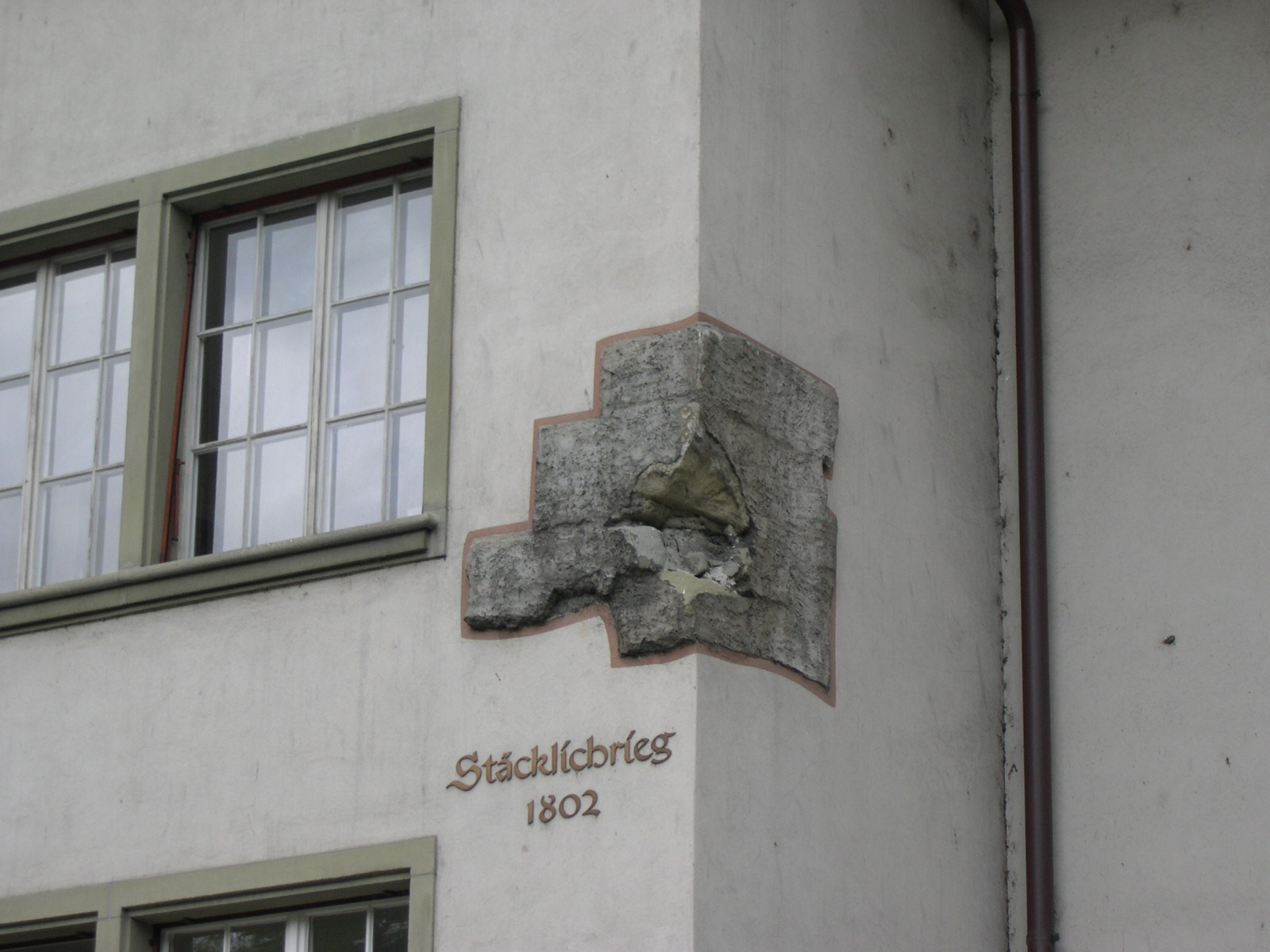 Einschussloch aus dem Stecklikrieg in einem Hausecke am Läuferplatz in Bern